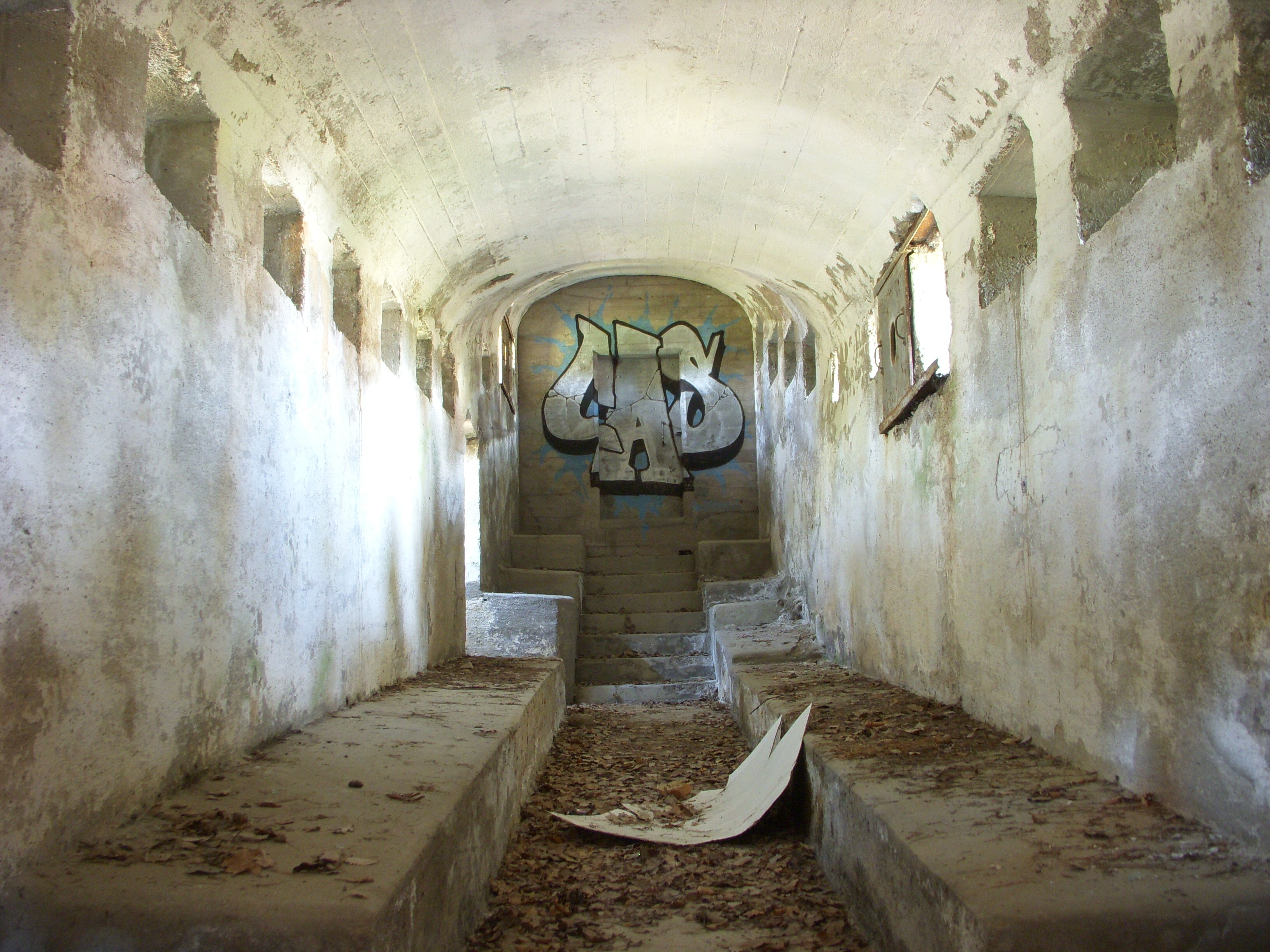 Västra Arningefortet, Täby